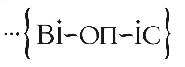 Titulo estilizado del álbum Bionic de Christina Aguilera